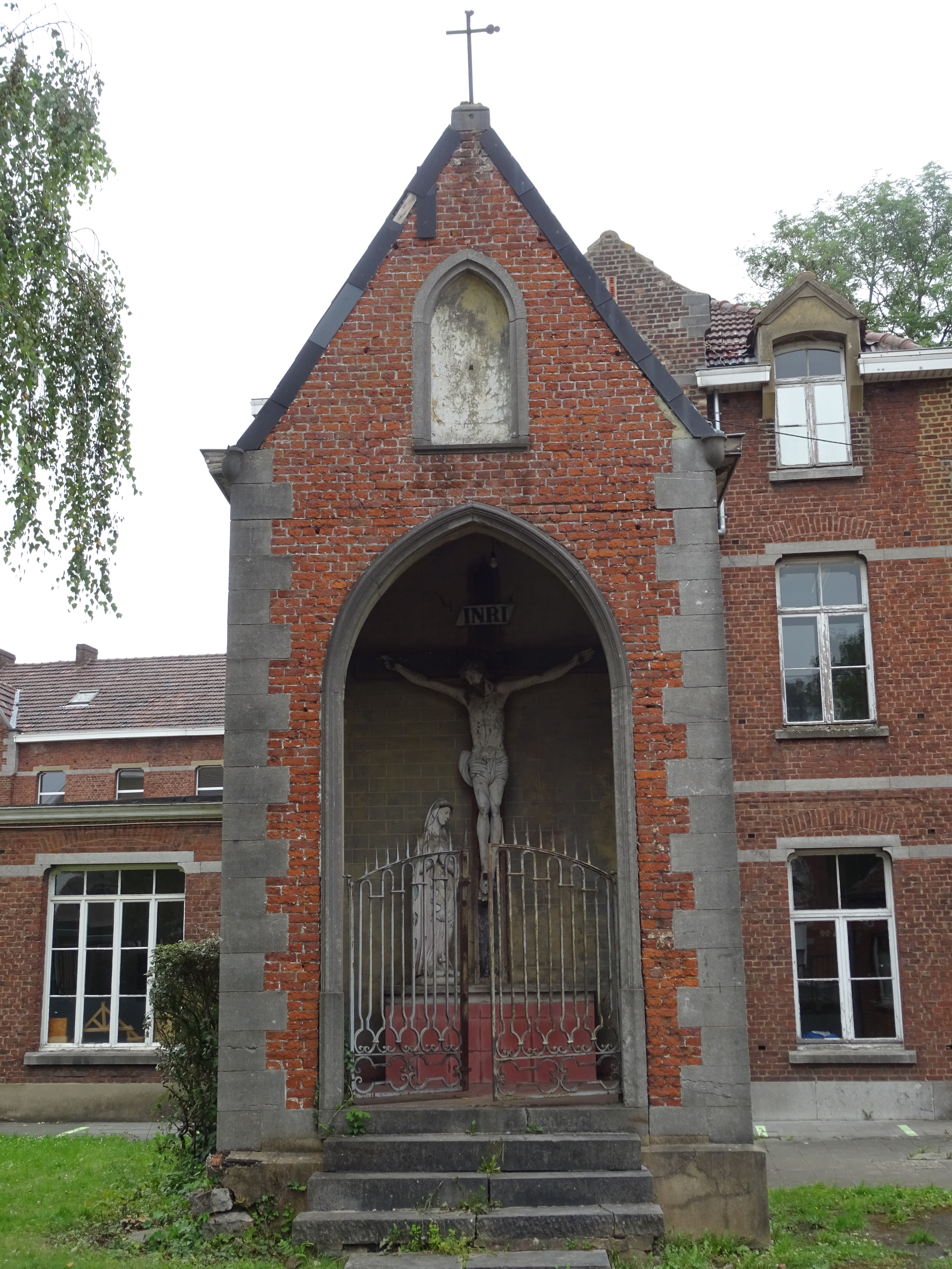 La chapelle Saint-Roch de Braine-le-Comte, vue d'ensemble.